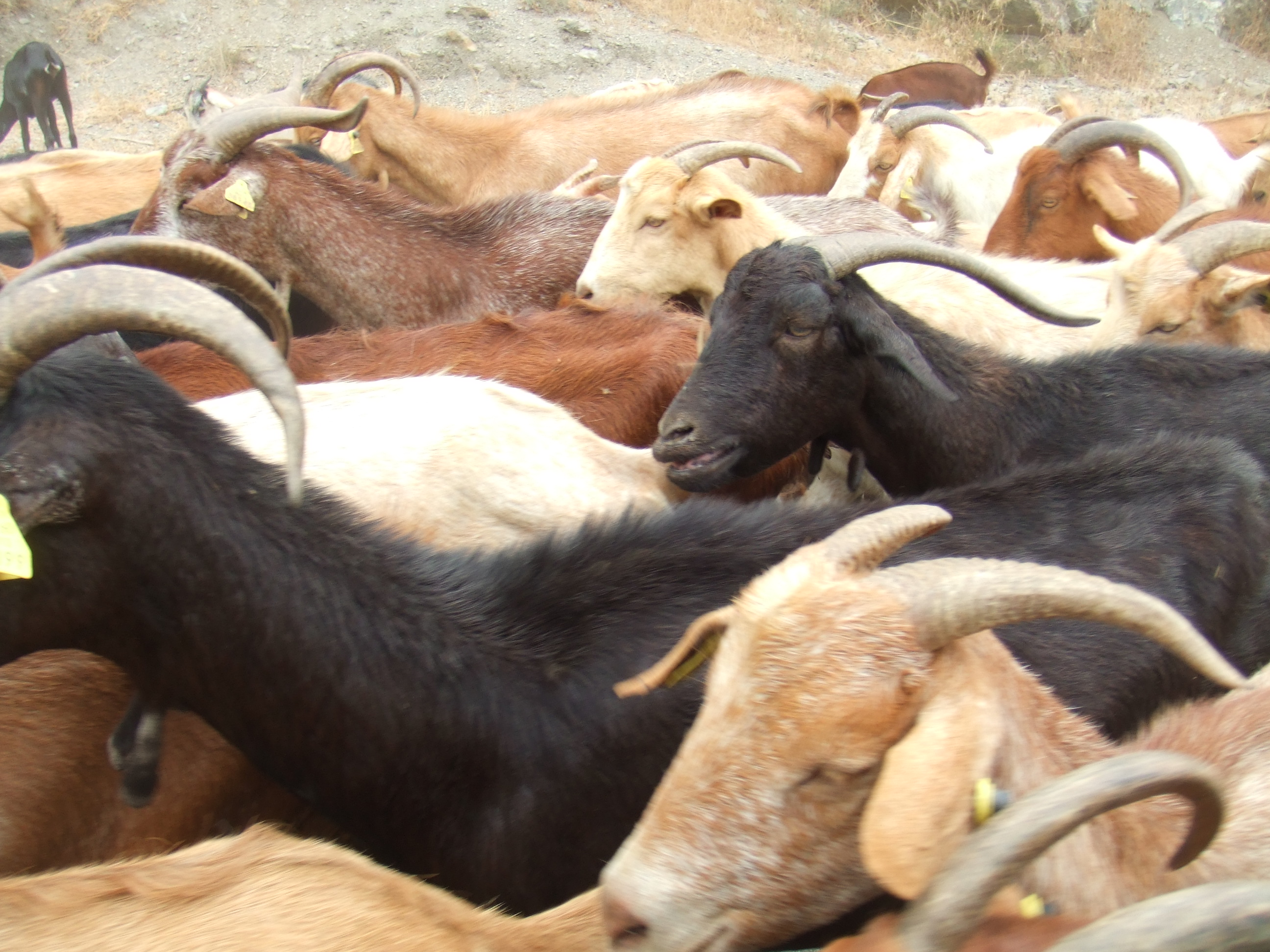 Ganado caprino